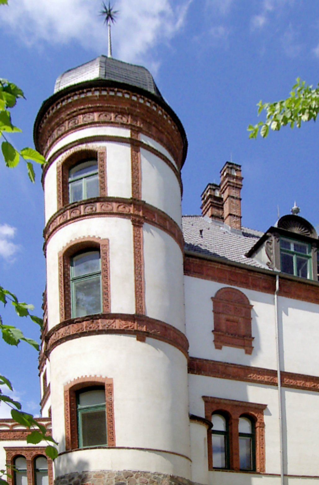 Südostturm des Schlosses Wiligrad, Lübstorf, Deutschland